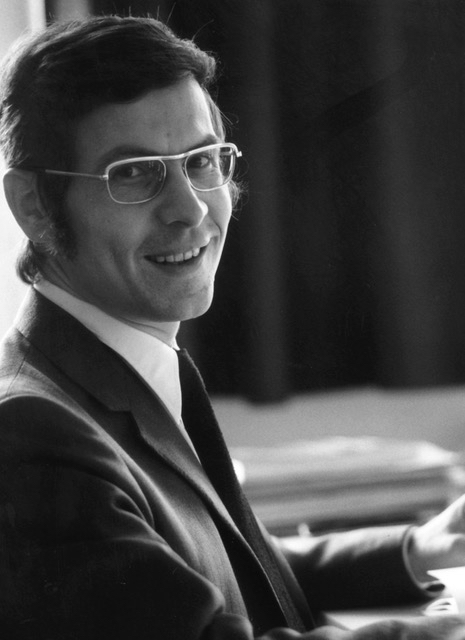 Portrait von Helmut Otto Schnelle